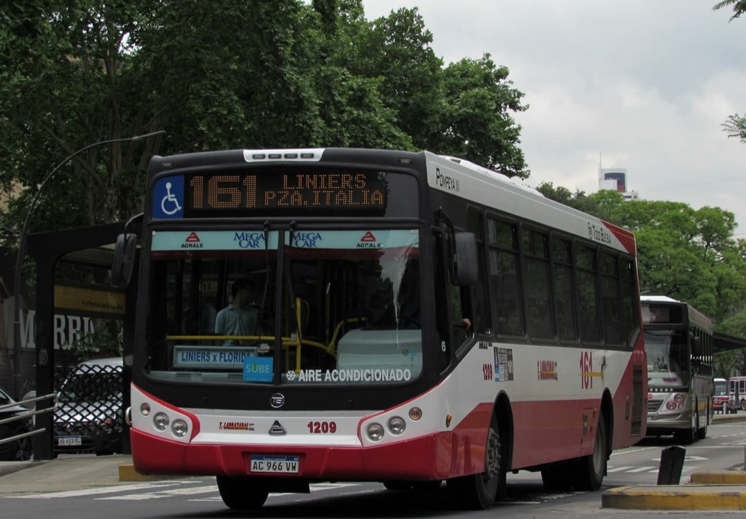 Línea 161 de Buenos Aires.